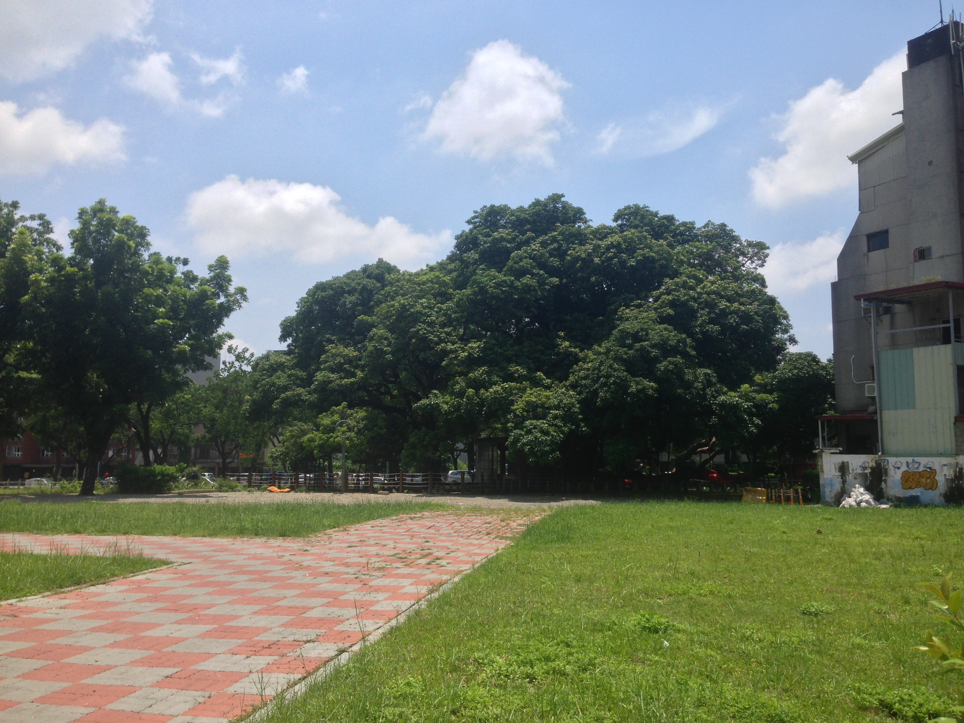 中文（台灣）: 後壠仔茄苳公一景